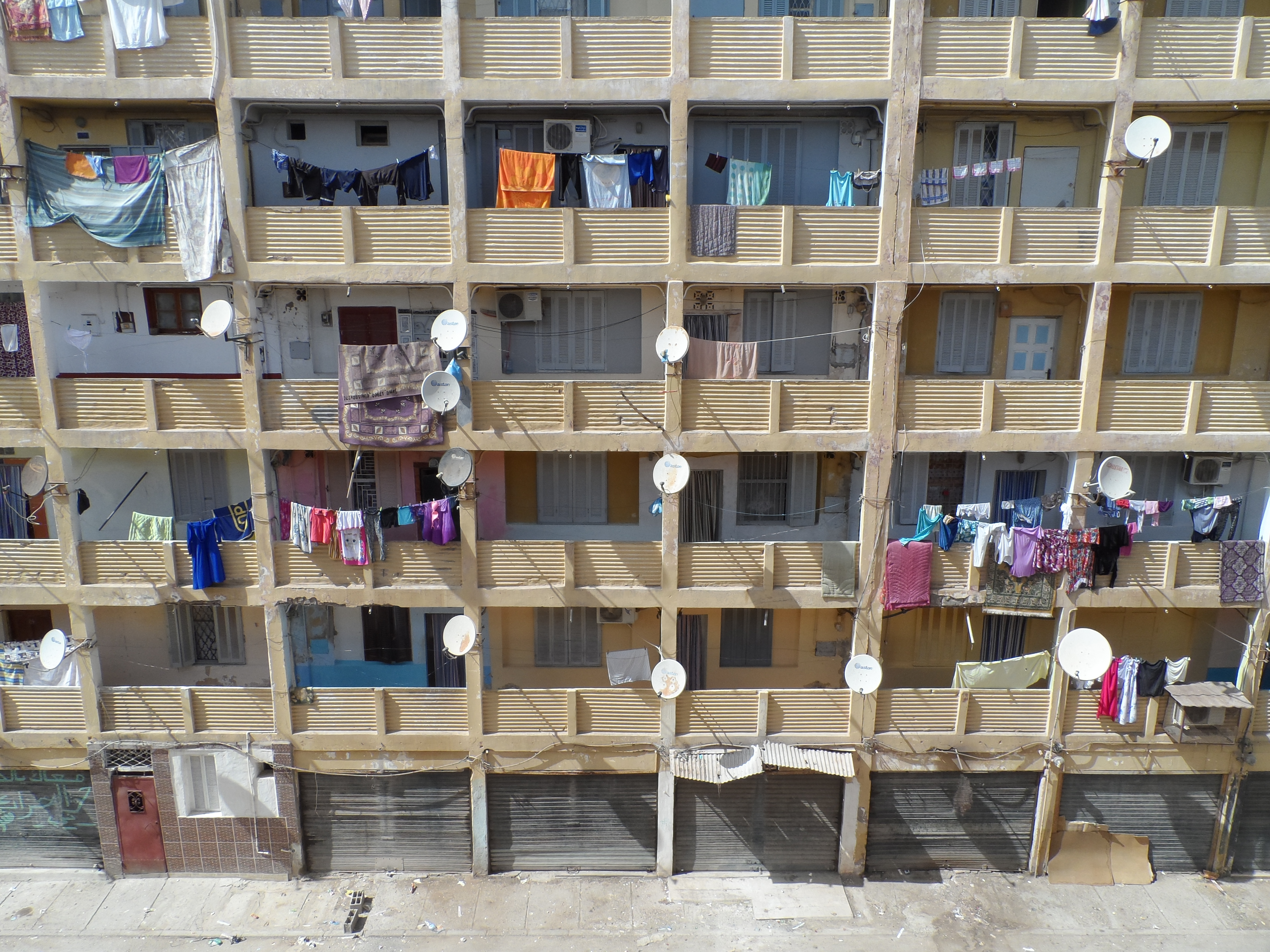 حي العرصة _ ولاية مستغانم _ بلد الجزائر